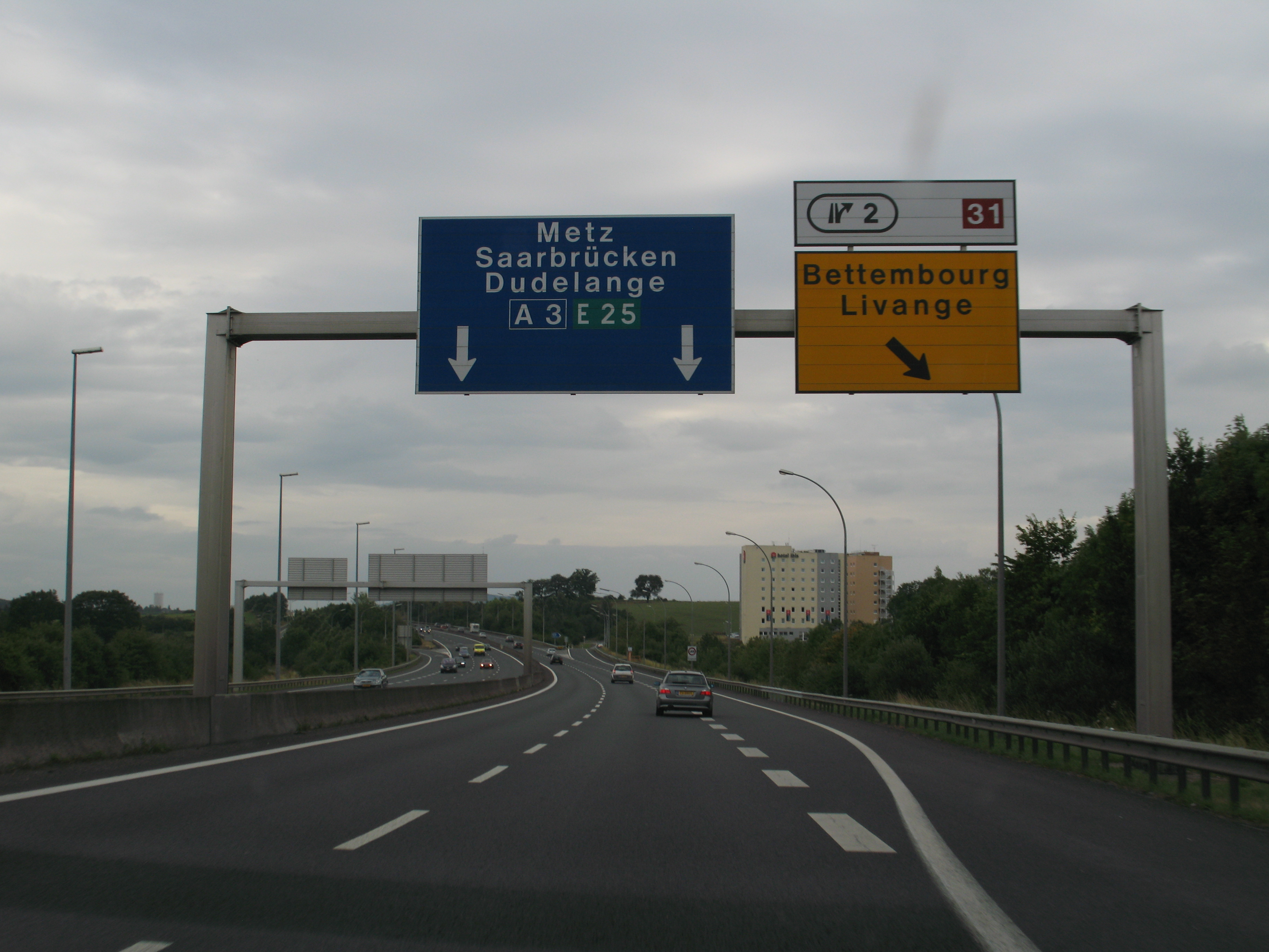 Panneau autoroutier A3 Luxembourg (vers France...)